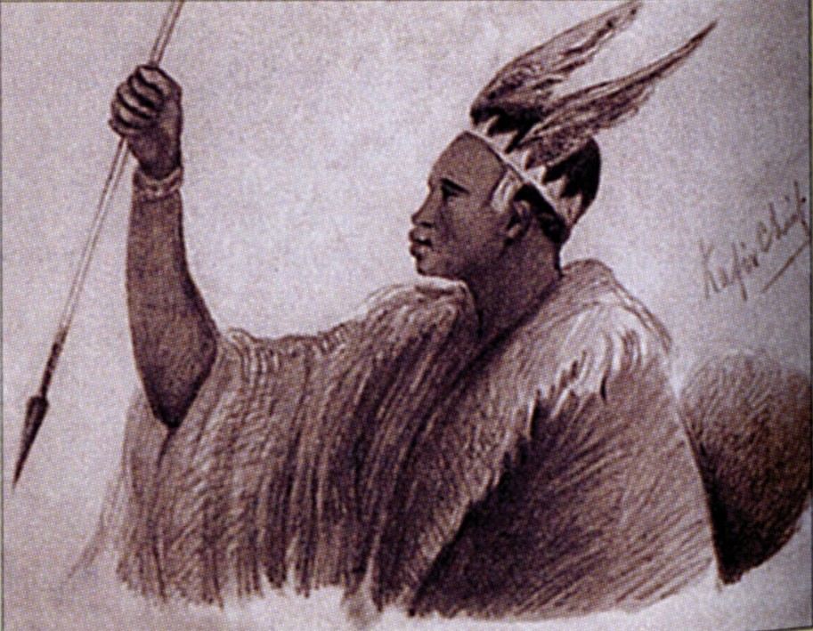 Рисунок, сделанный И. А. Гончаровым во время путешествия на фрегате "Паллада" (1852-1855)